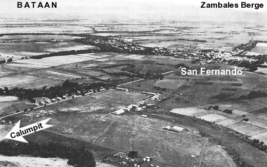 San Fernando , Philippinen, 1941)